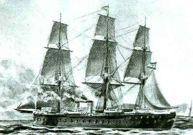 Grabado de la fragata blindada Vitoria.